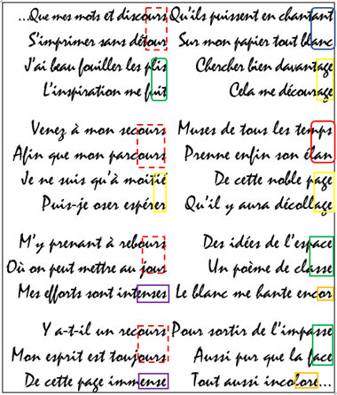 Sonnet produit d'après le moule